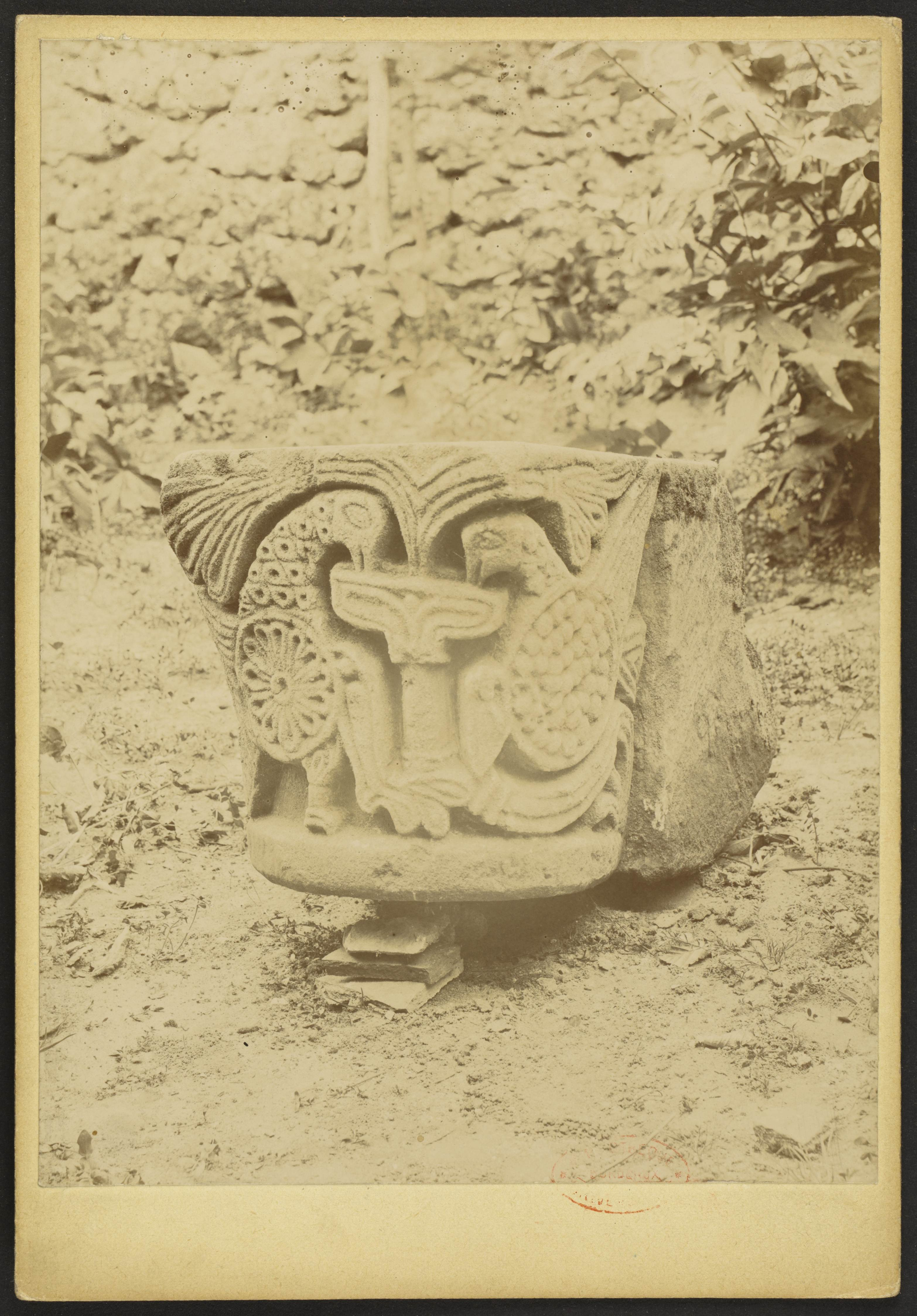 Eglise Saint-Martin de Bommes; Chapiteau